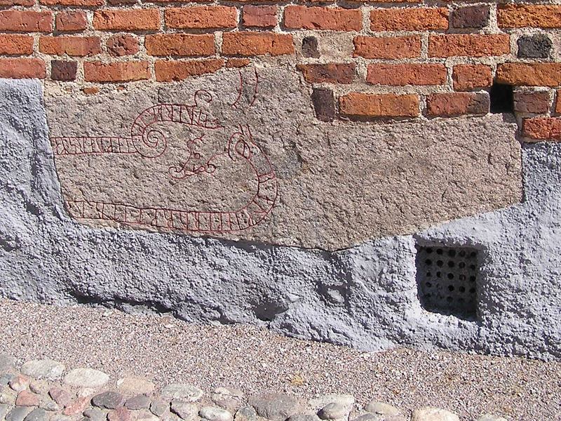 Runsten SÖ277. Strängnäs dom, södra vägg.